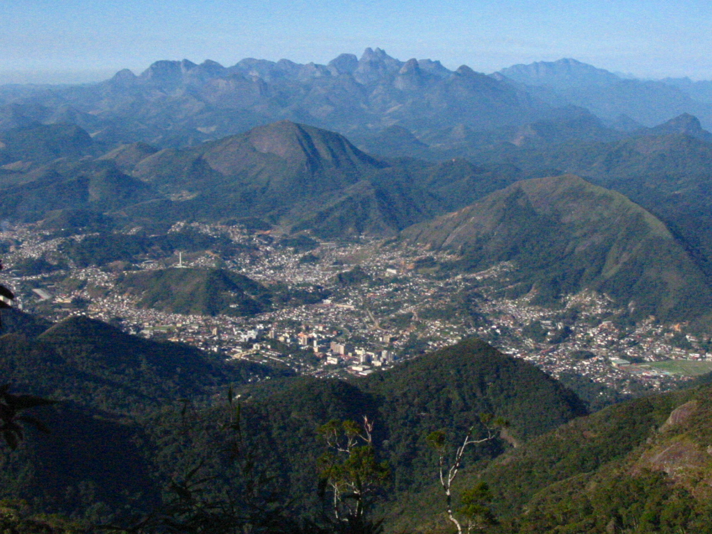 Vista da cidade de Teresópolis da Pedra do Sino